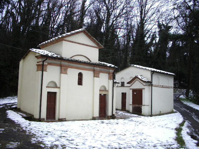 San Vivaldo, Montaione, due cappelle